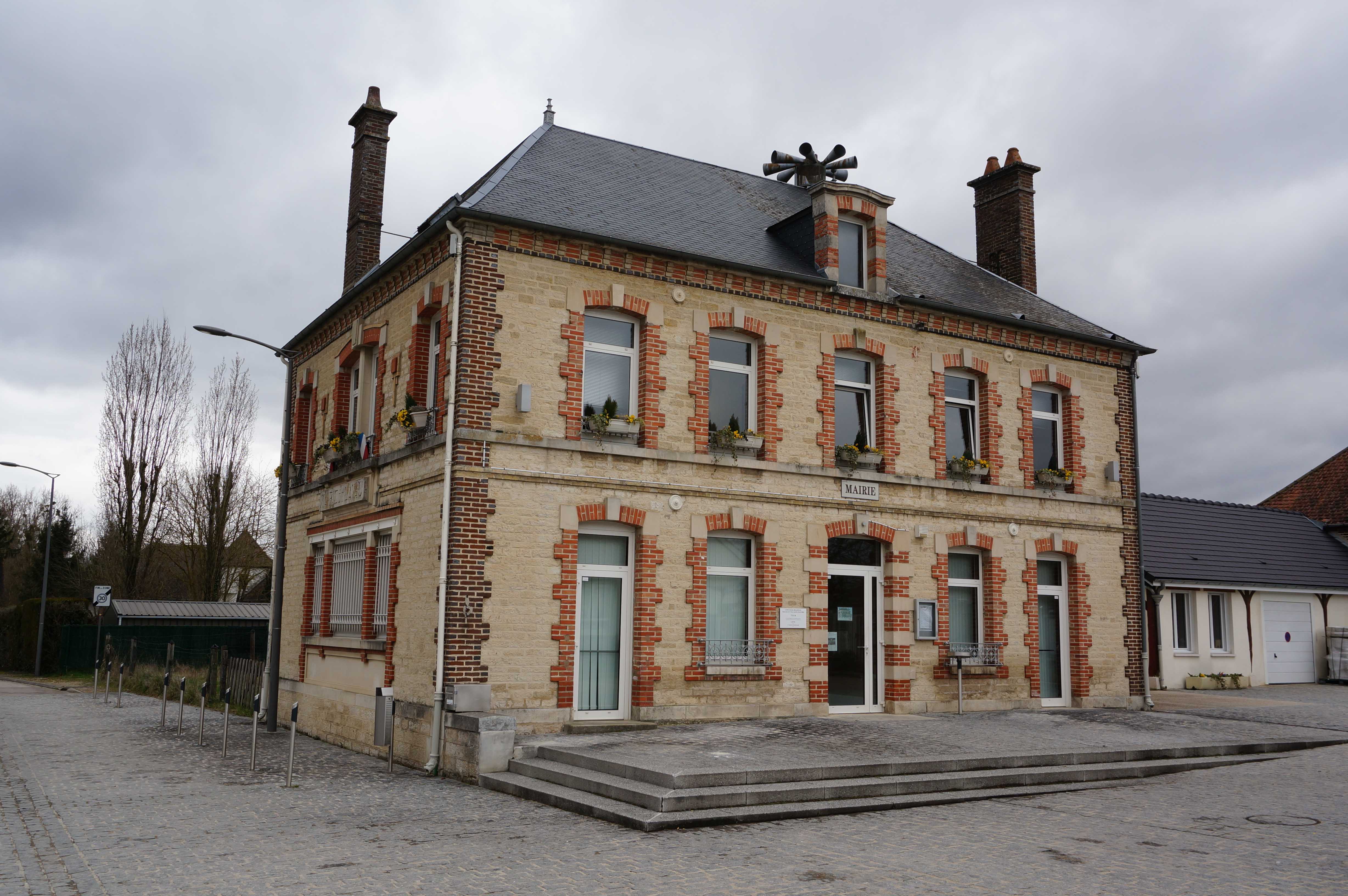 à Lavau.